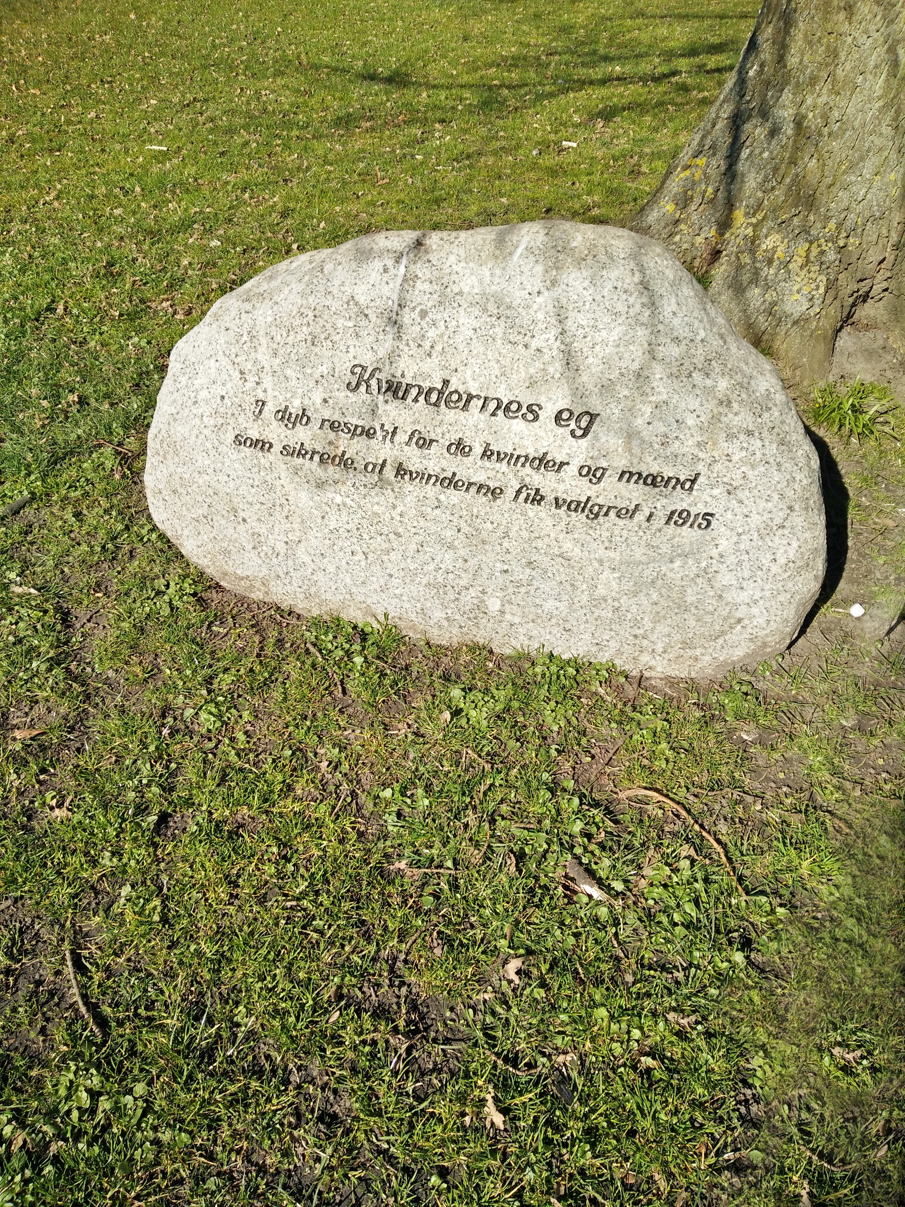 Mindesten foran Kvindeegen ved Koldinghus.